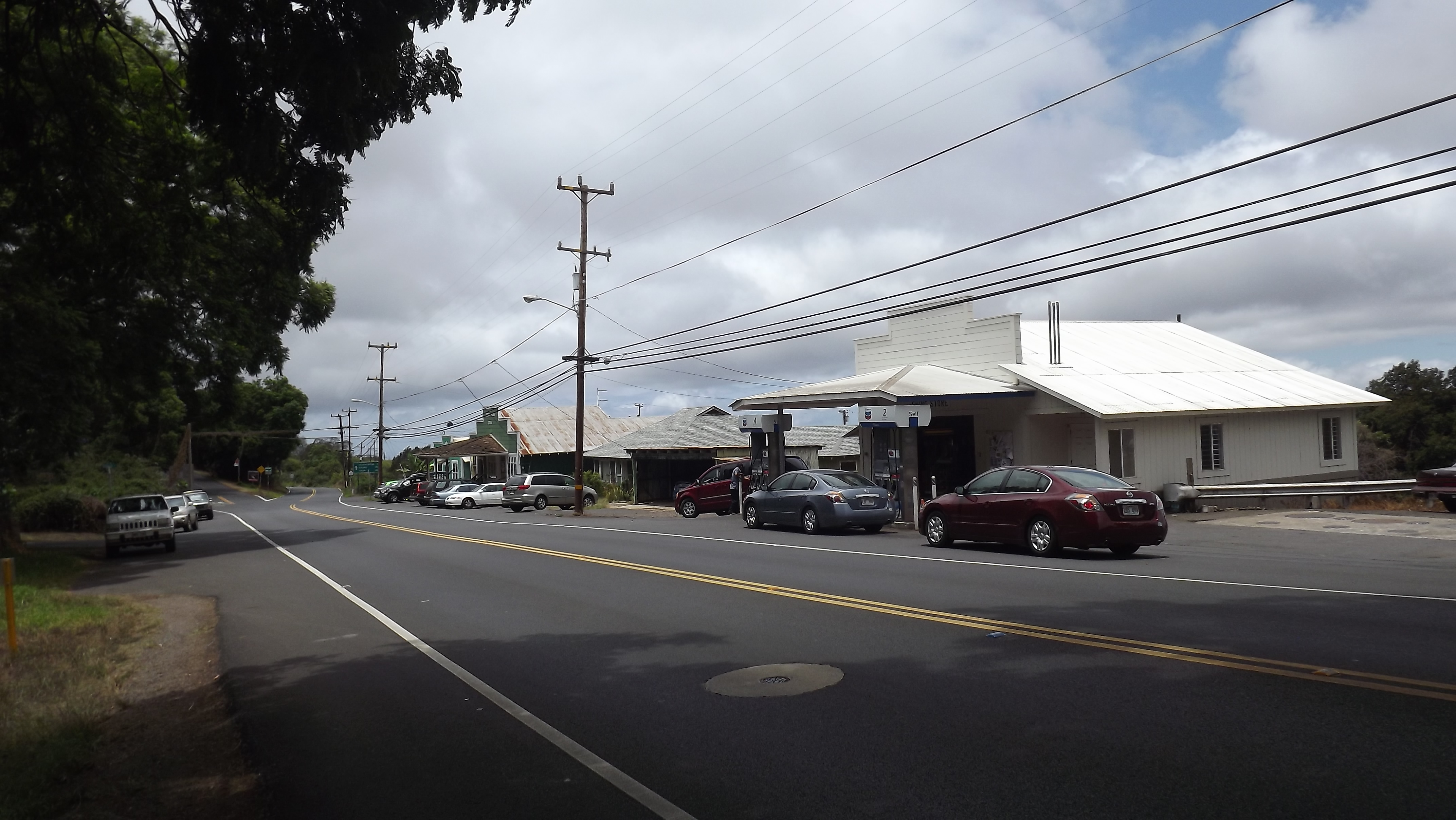 Keokea, Maui.